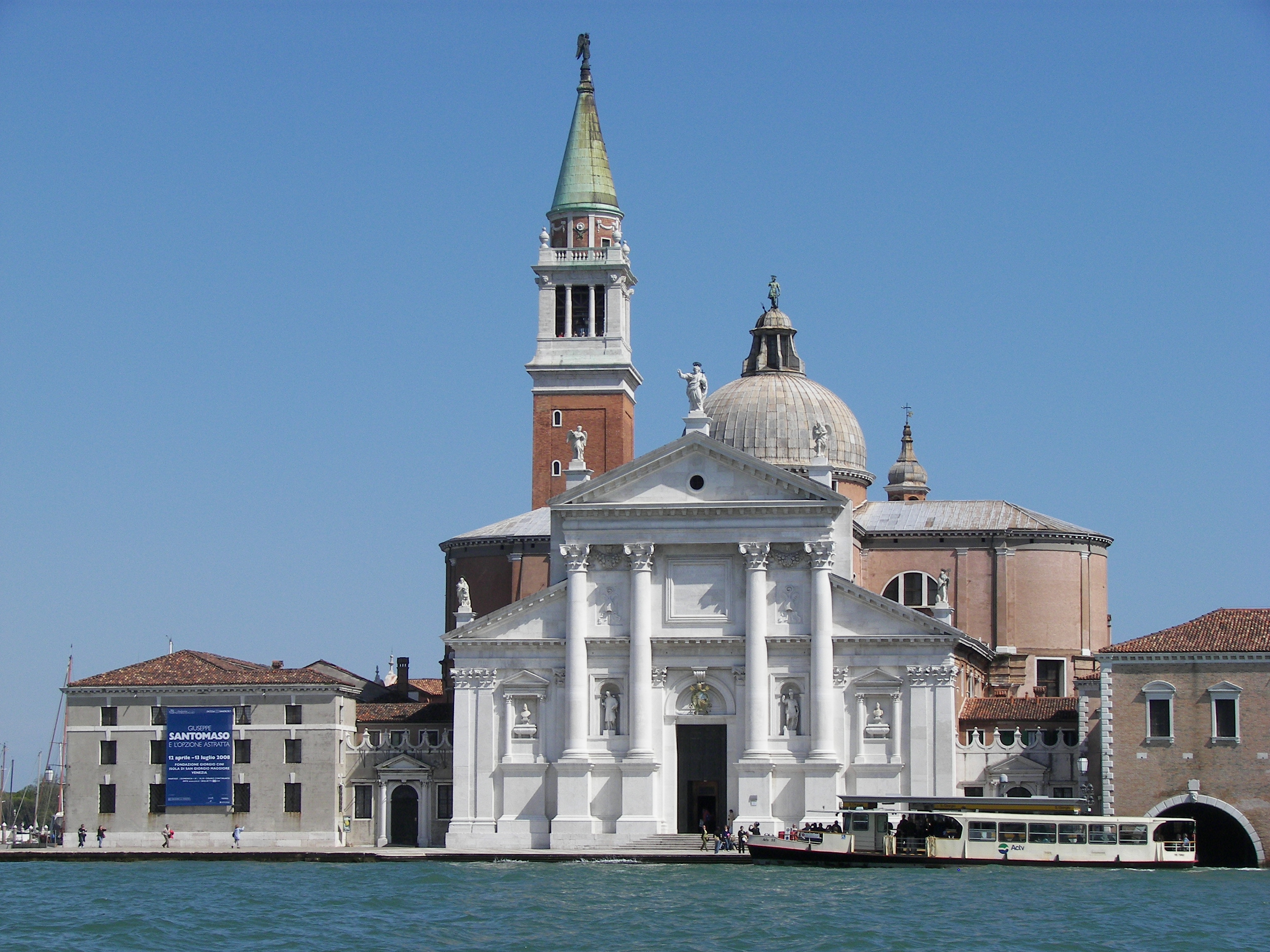 San Giorgio Maggiore in Venezia.